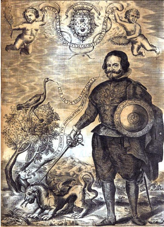 Retrato alegórico del conde-duque de Olivares. Grabado de Francisco Navarro para Extremos y grandezas de Constantinopla compuesto por Rabí Moysen Almosnino… traducido por Iacob Cansino, en Madrid, en la imprenta de Francisco Martínez, 1638. Biblioteca de la Universidad Complutense de Madrid.